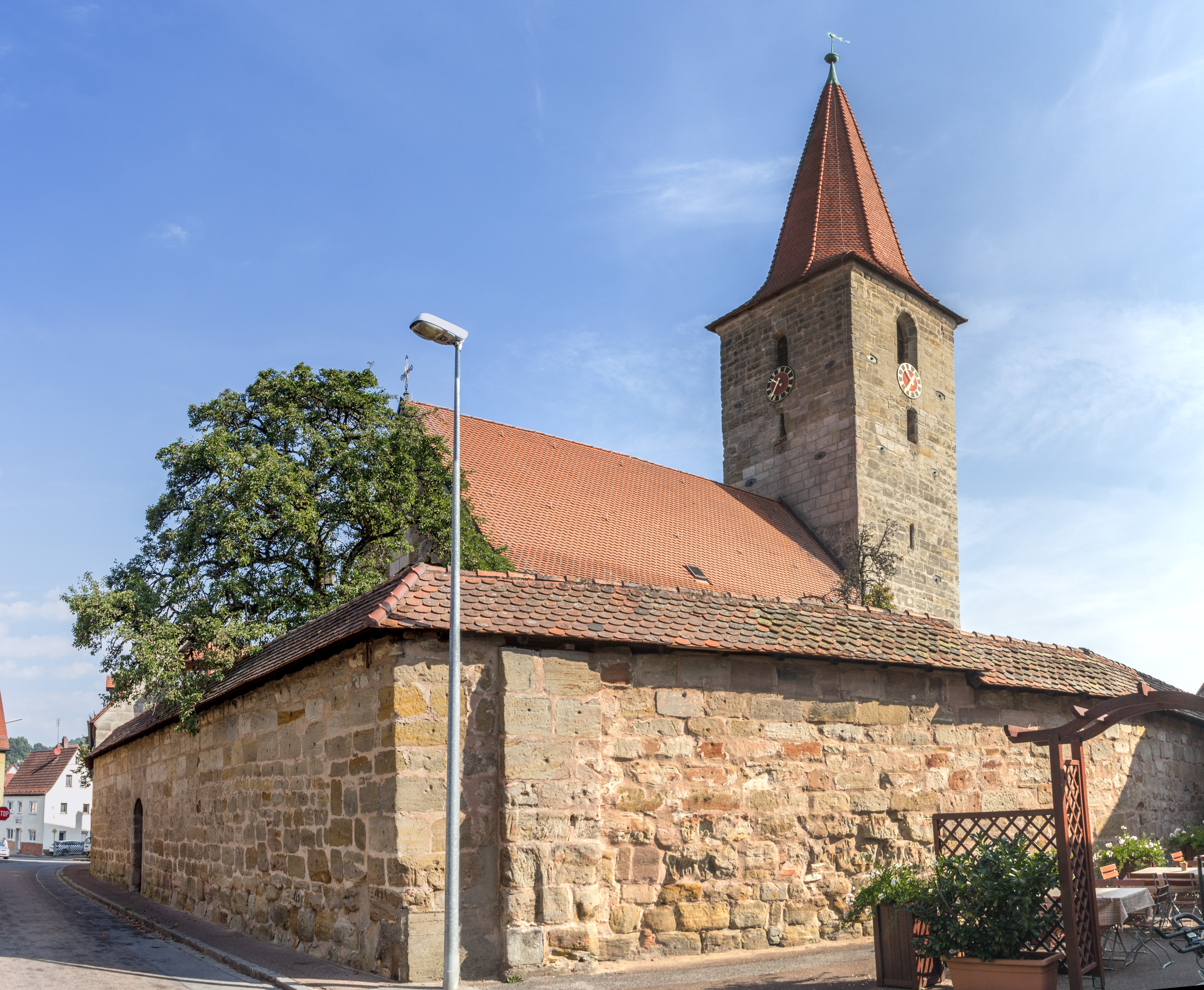 Evangelisch-lutherische Pfarrkirche St. Leonhard, LeinburgThis is a photograph of an architectural monument.